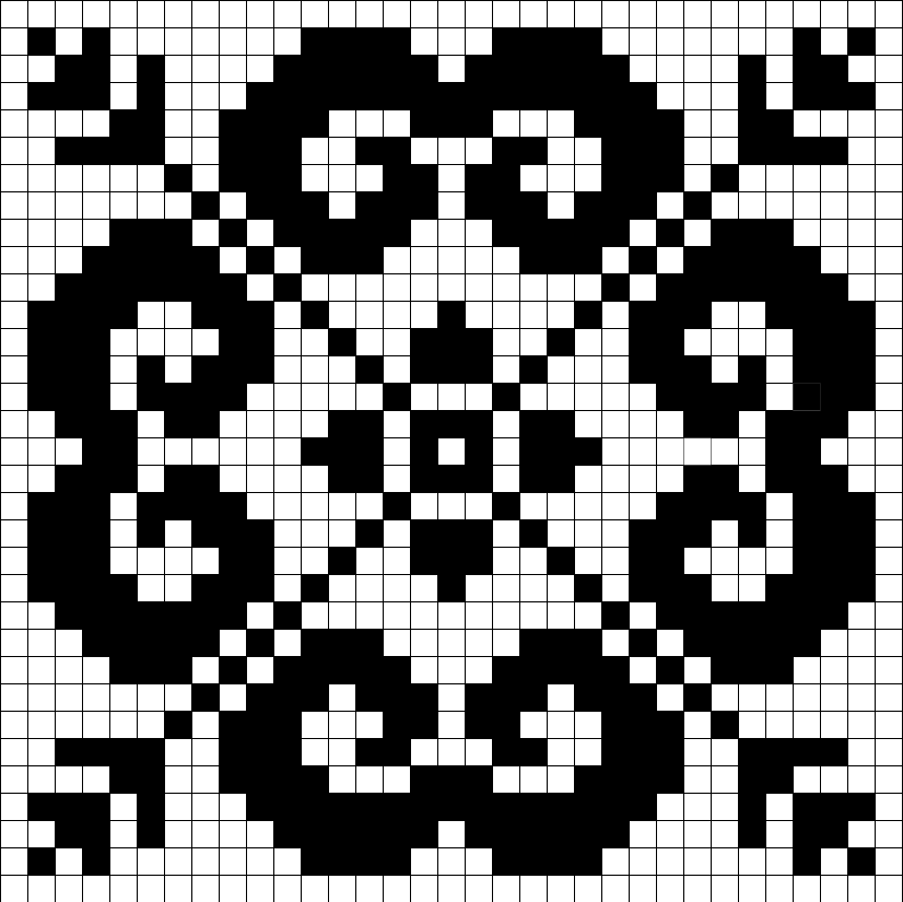 Motif tricot norvégien, trienn